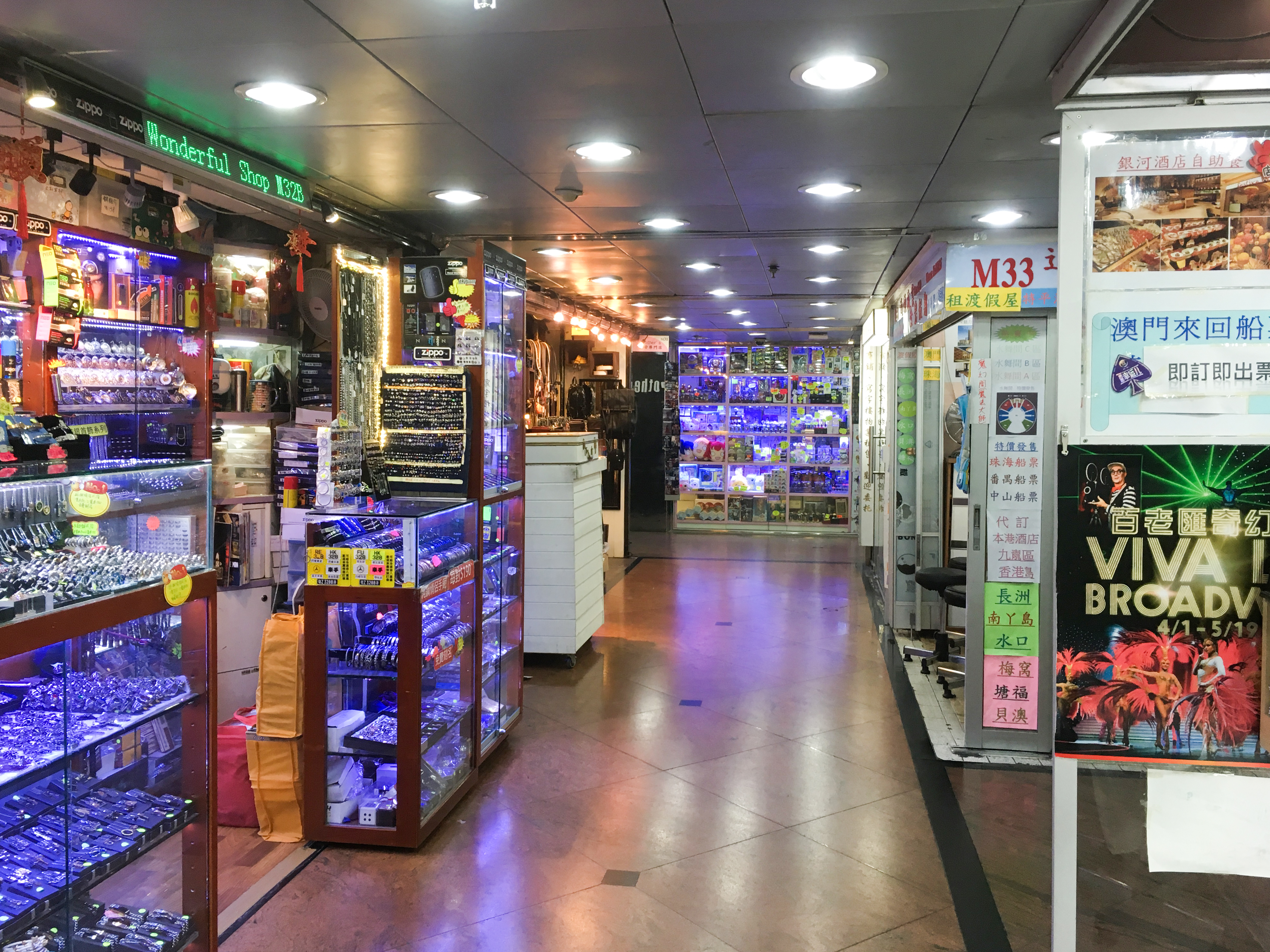 Sino Centre Shops